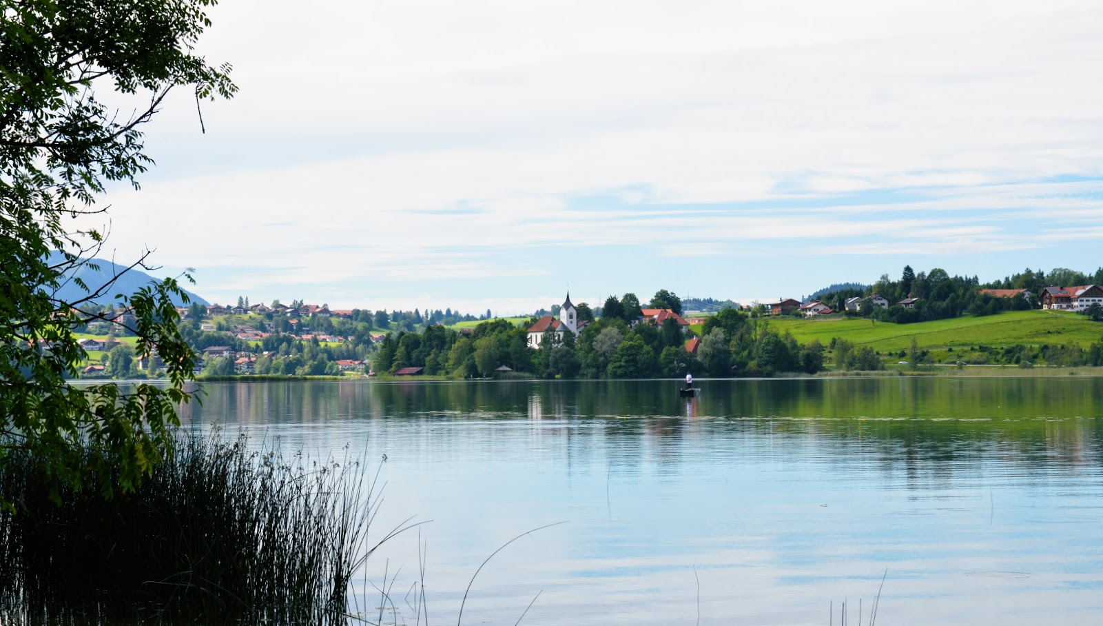 Blick vom Nordufer auf Weißensee (2017)